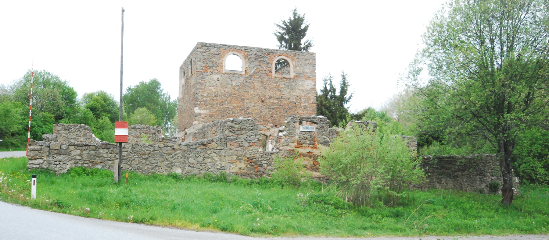 Döllersheim in Niederösterreich - ehemaliges Spital